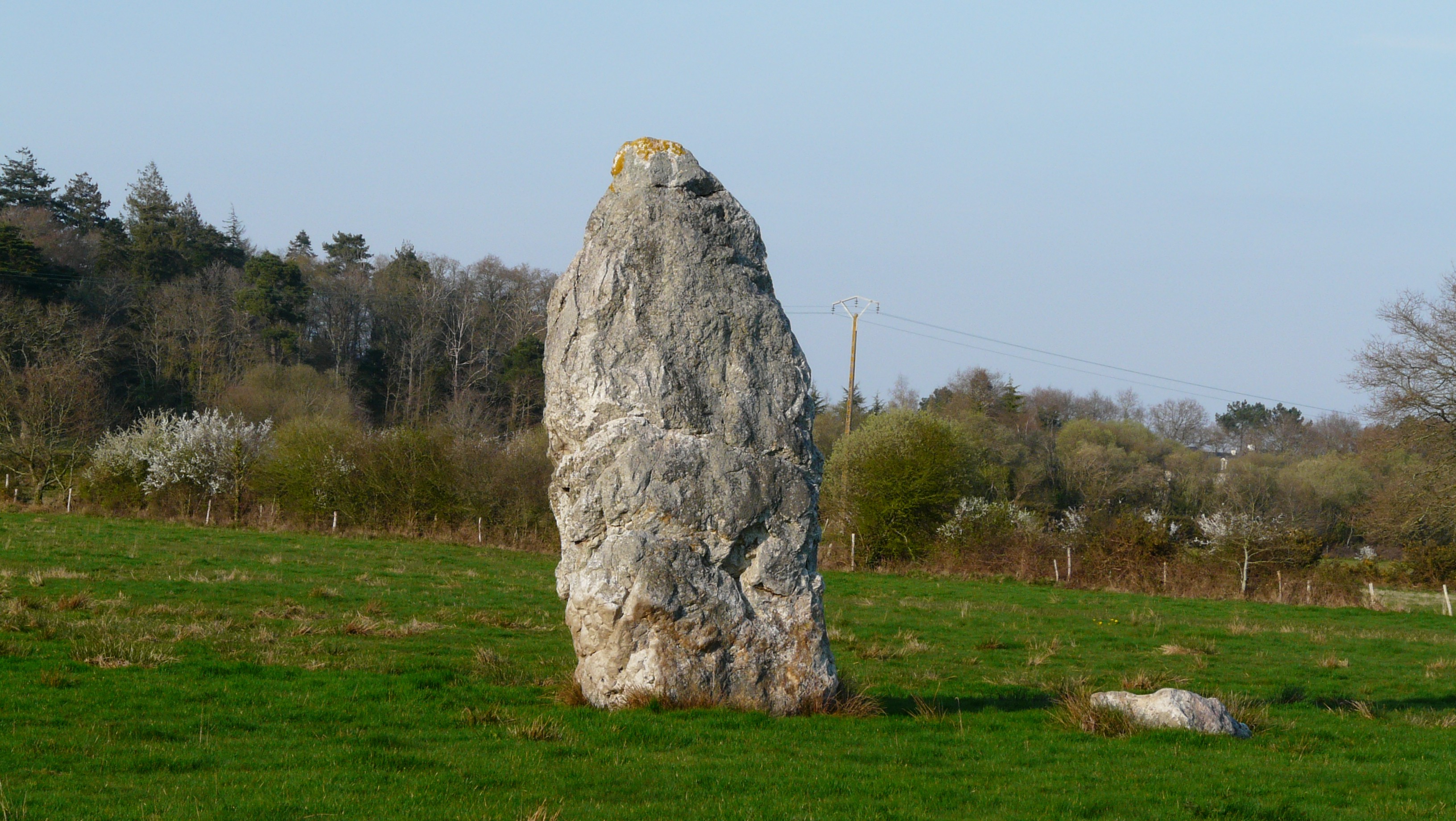 La Lande de la Madeleine était, depuis toujours sans doute, une terre inculte, qui servait de pâture commune aux troupeaux des habitants voisins. Quelques chaumières seulement étaient disséminées aux alentours. Dans la forêt toute proche, il y avait eu jadis une léproserie, dont l'emplacement exact semble ignoré; et, à la lisière de la forêt, une petite chapelle était depuis longtemps dédiée à Sainte Marie-Madeleine. A quelques centaines de mètres en allant vers Crossac, un menhir, de sept mètres de haut, dénommé " le Fuseau de la Madeleine ", se dresse encore, témoin muet d'un passé lointain et mystérieux